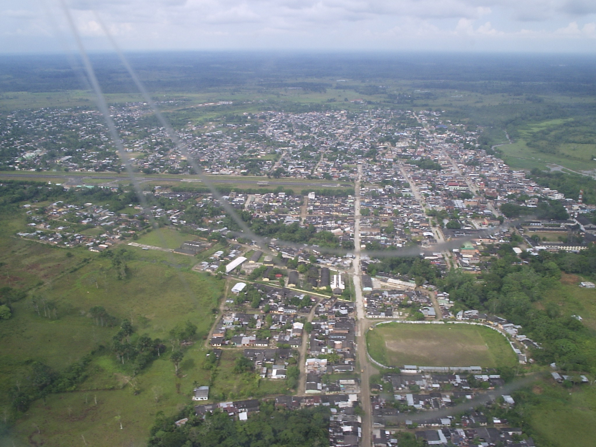 VISTA PANORAMICA DE PUERTO ASIS